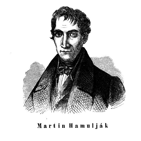 Martin Hamuljak - slovenský jazykovedec, redaktor a vydavateľ